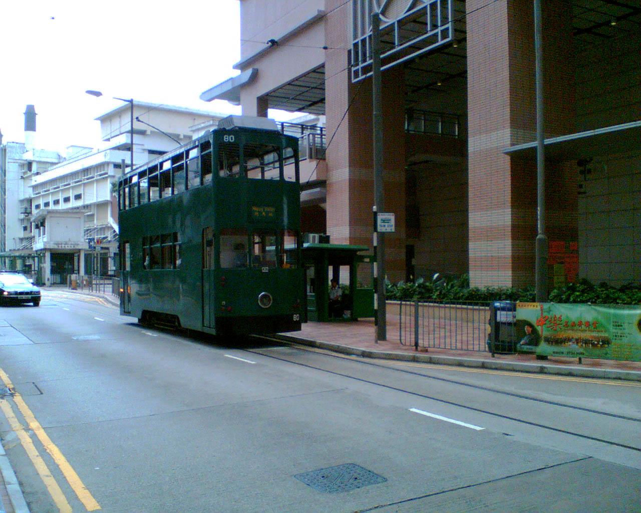 堅尼地城電車總站；來源：自拍照片；日期：2006.05.25；作者：User:Chong Fat